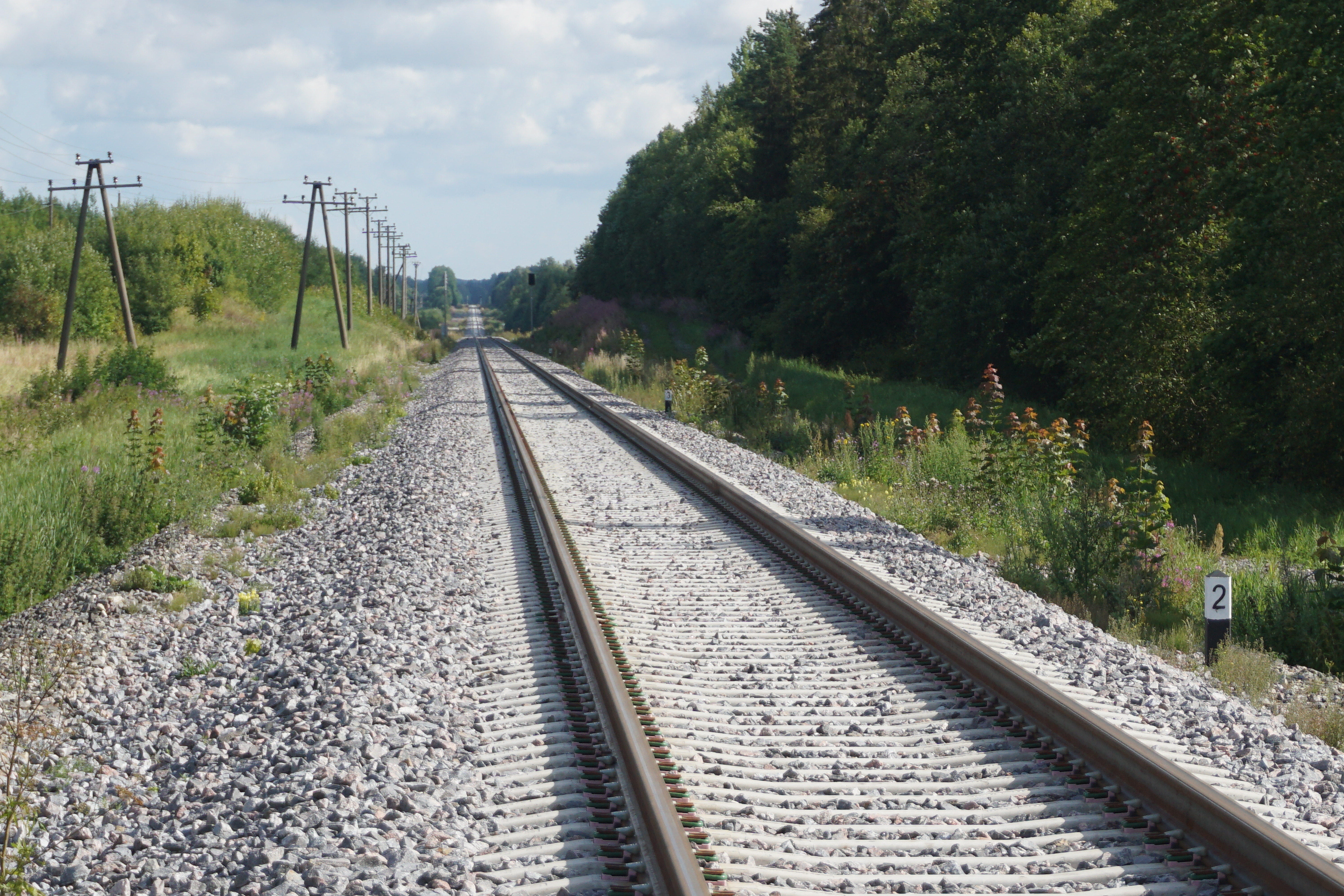 Tapa-Narva raudtee endise, 1980. aastate lõpus suletud, Udriku jaama lähedal